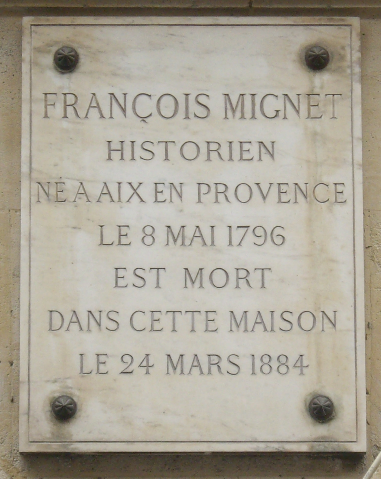 Plaque apposée sur l'immeuble du 12 rue d'Aumale, Paris 9e, où mourut l'historien François-Auguste Mignet (1796-1884).